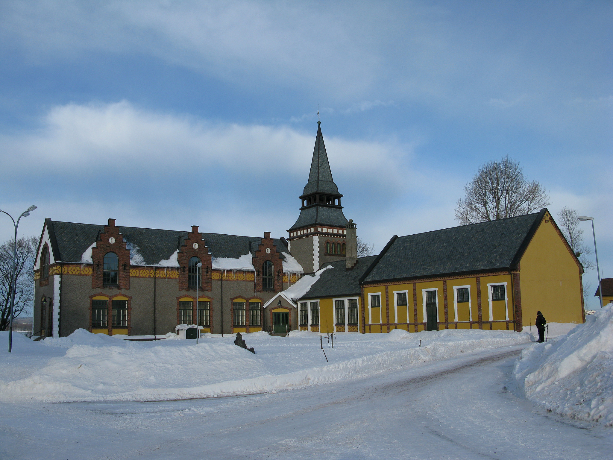 Bastøy kapell. Foto: Hanna Kosonen Geiran, fra Kulturminnebilder.no.